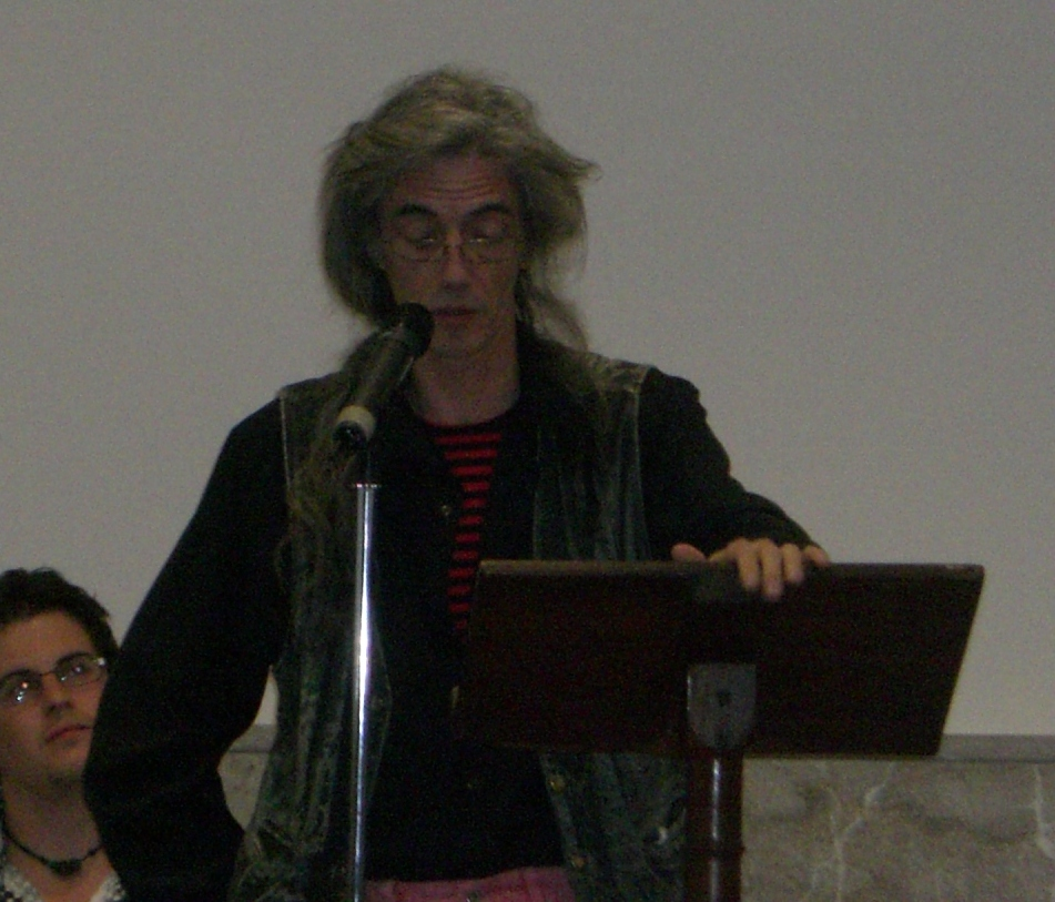 Enric Casasses i Figueras